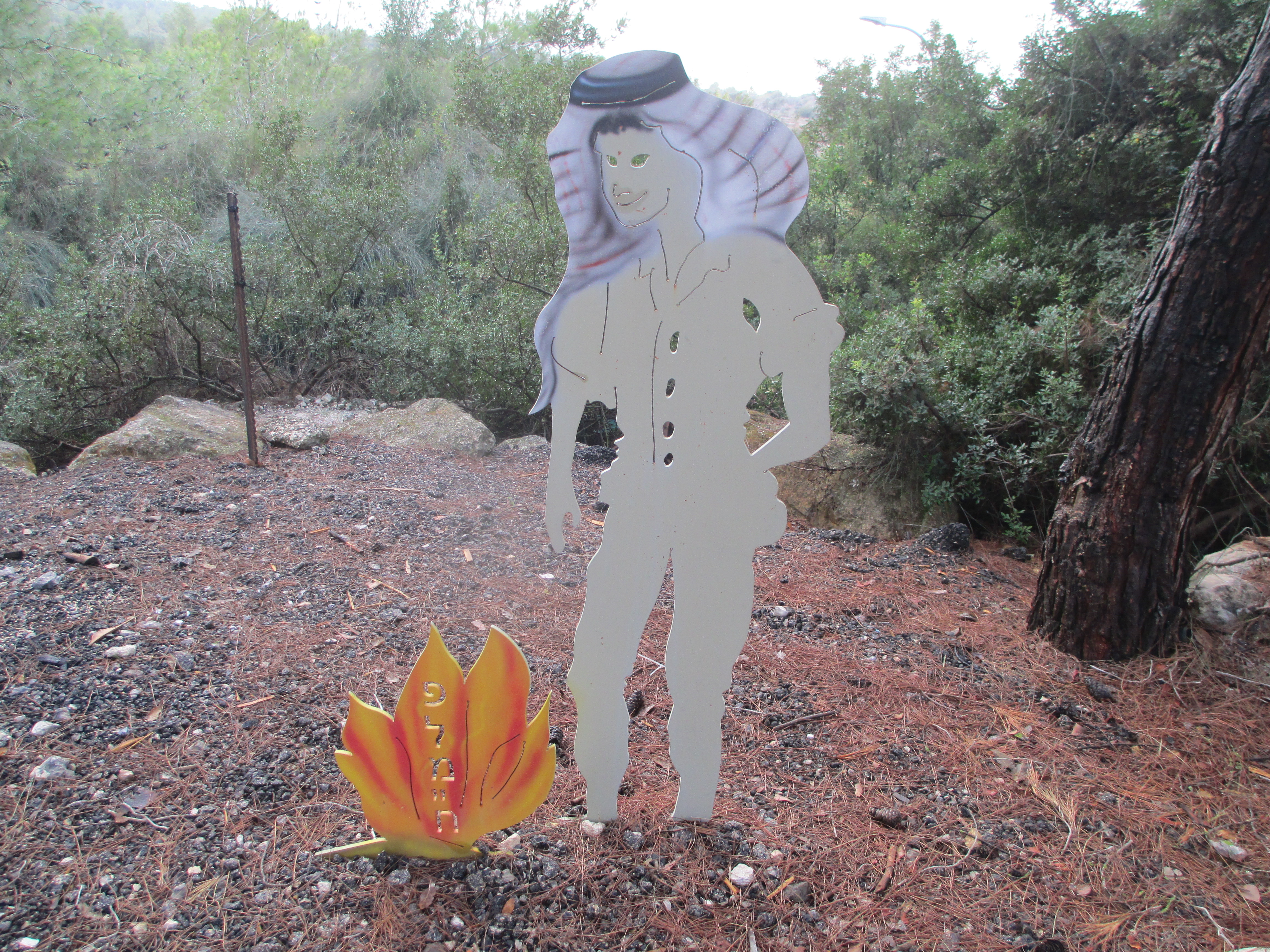 פסל מדורות הפלמ"ח - מסתערב